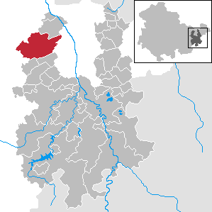 Kraftsdorf in Thuringia - District Greiz